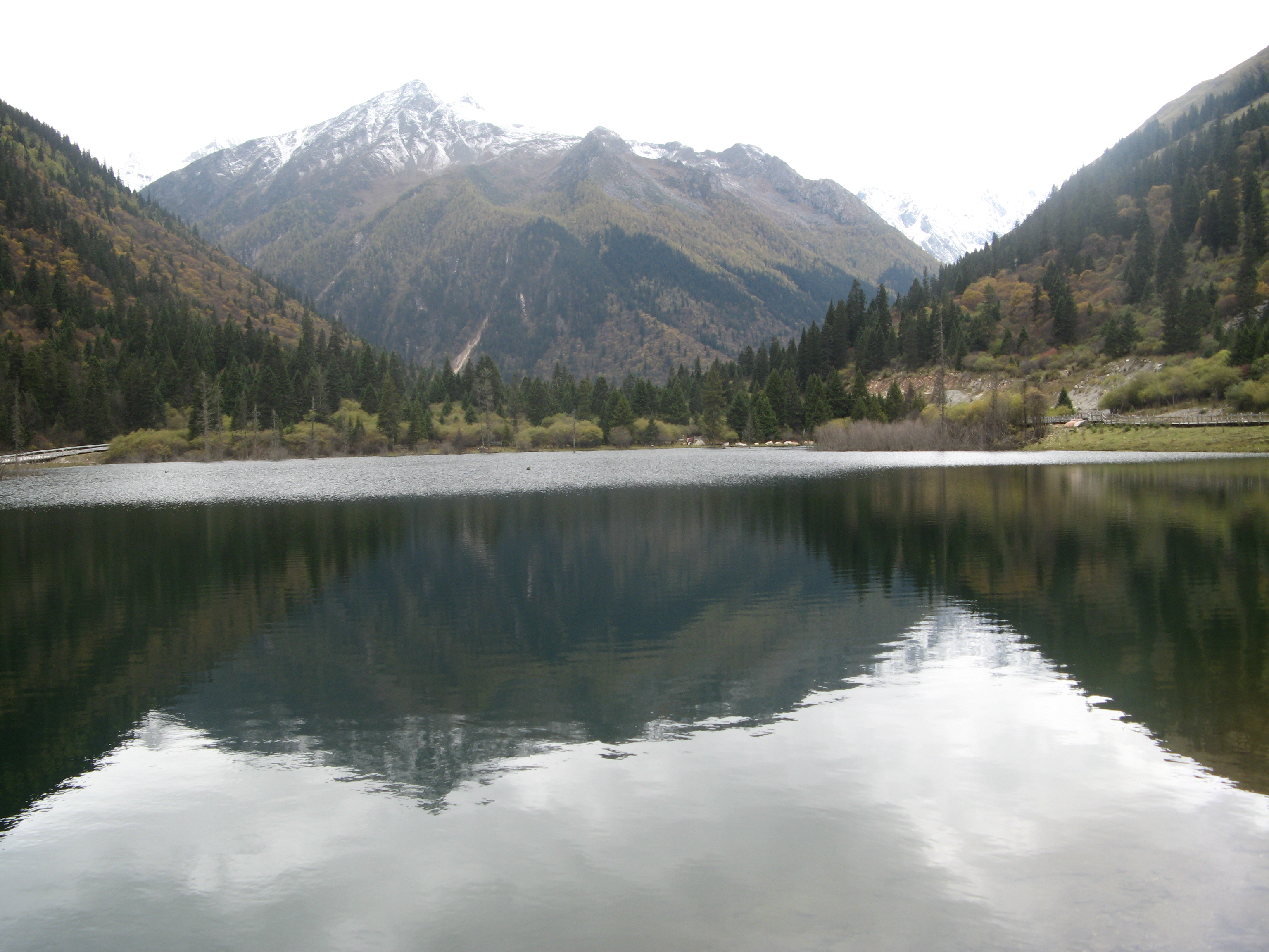 冰川湖泊在水中倒影